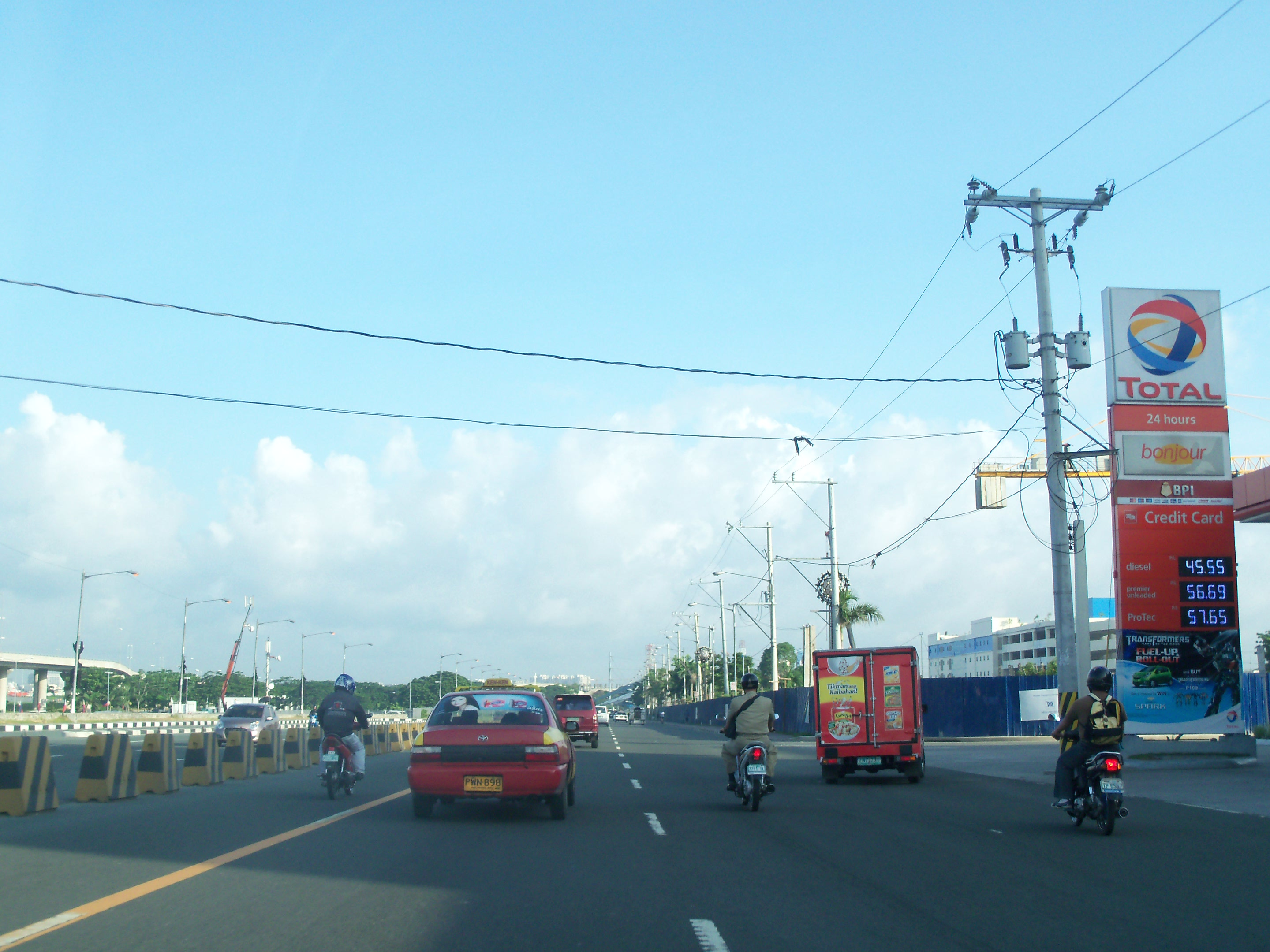 Pasay, 1300 Metro Manila, Philippines